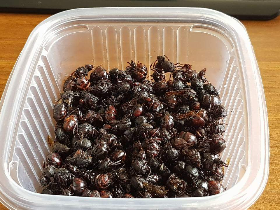 En la zona de Apolo, en el Norte Paceño se preparan estas hormigas en aceite y se las comen